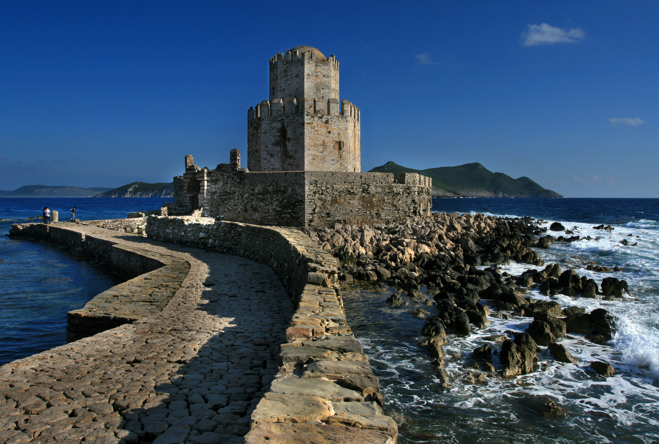 Κάστρο Μεθώνης«Κάστρο Μεθώνης»